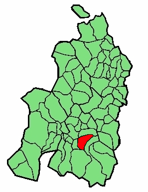 Ahatsa-Altzieta-Bazkazane udalerriaren kokapena Nafarroa Beherean